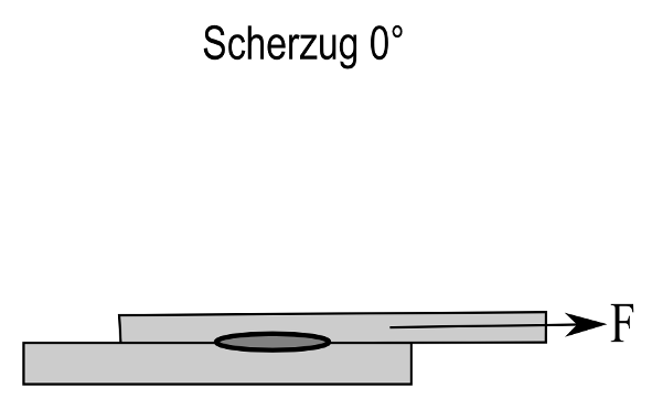 Prüfung von Kleinteilschweißverbindungen: Scherzugprüfung - Winkel 0°